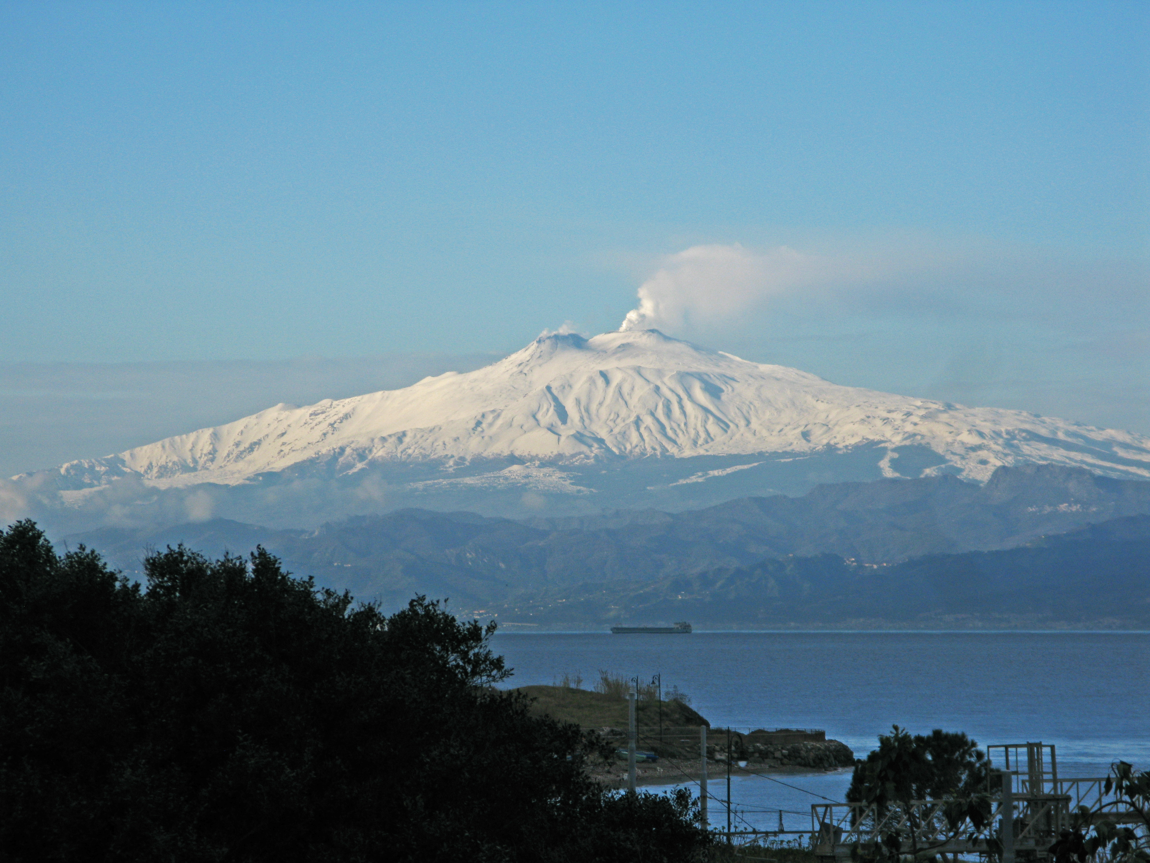 Etna